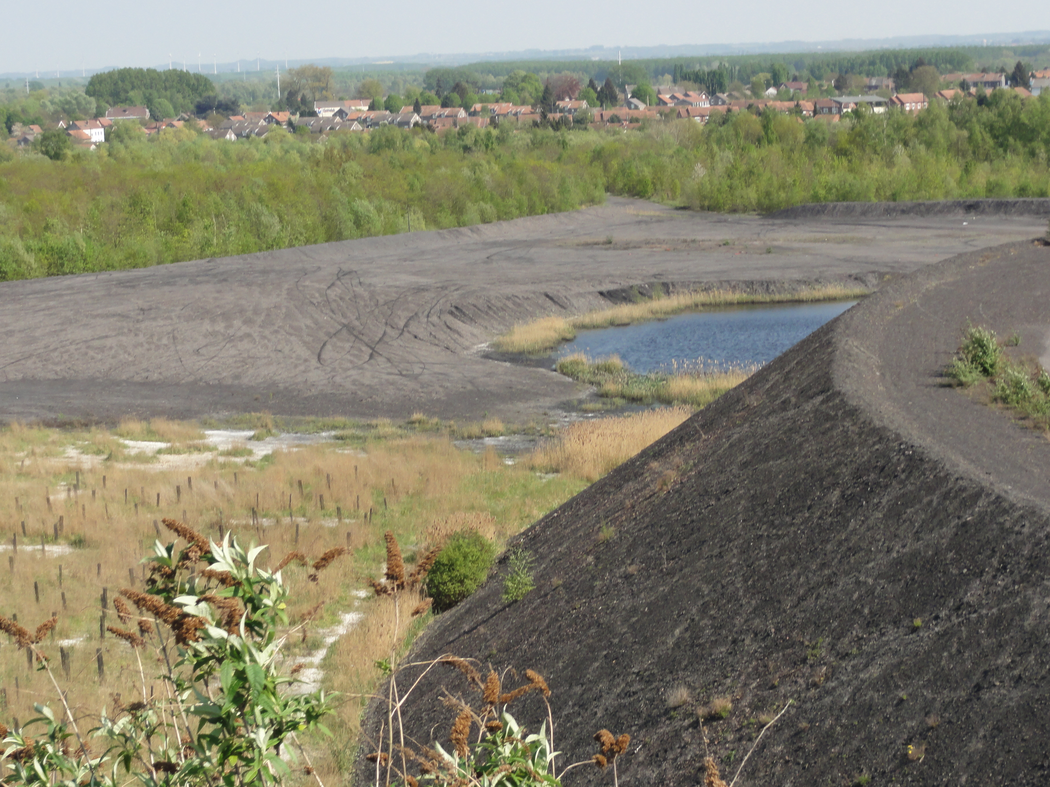 Terril n° 178 dit La Grange Ouest, Fosse La Grange de la Compagnie des mines d'Anzin, Raismes, Nord, Nord-Pas-de-Calais, France.